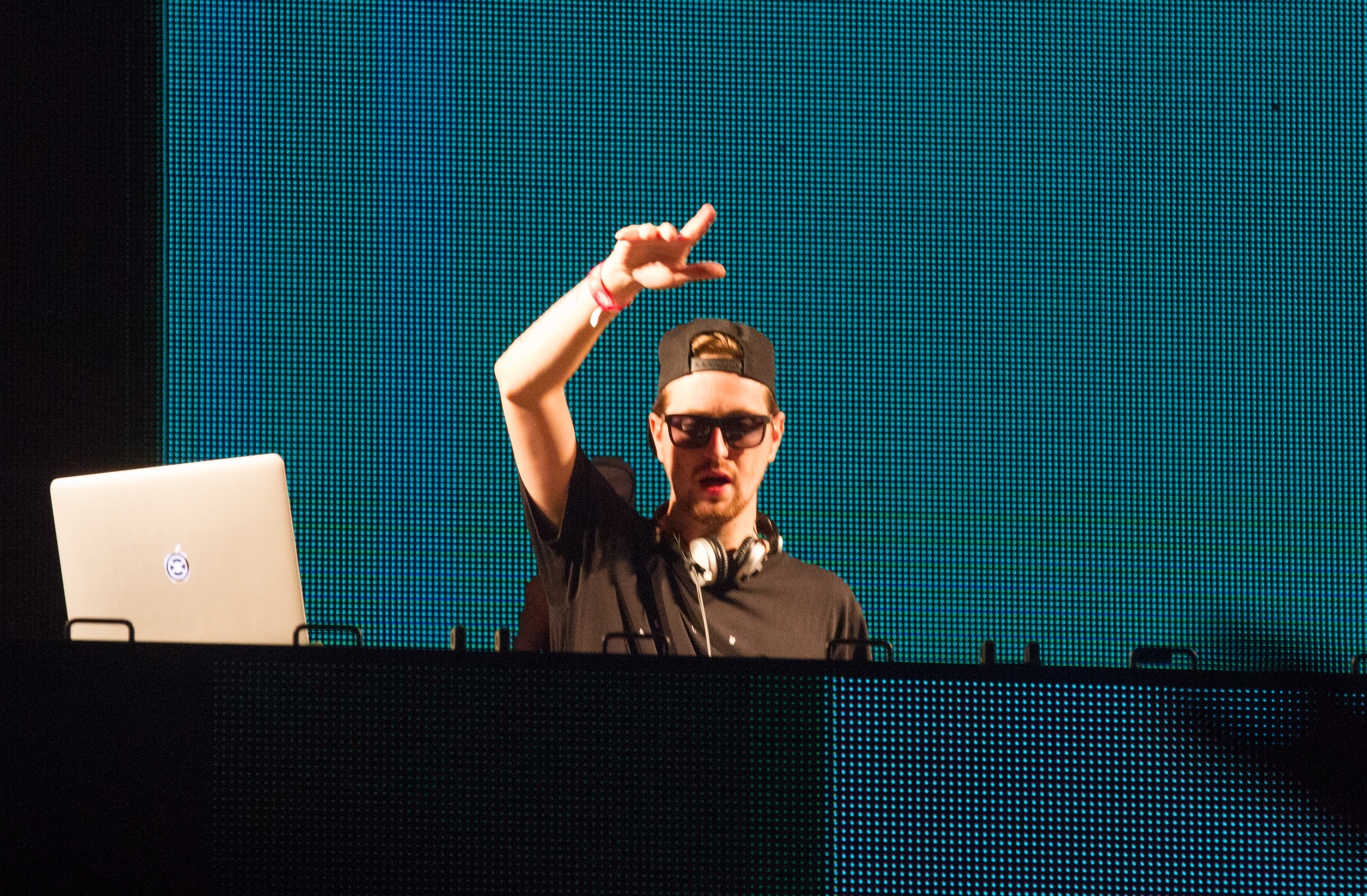 Robin Schulz beim 14. Airbeat-One Dance Festivals das vom 16. bis 19. Juli 2015 auf dem Flugplatz Neustadt-Glewe stattfand.